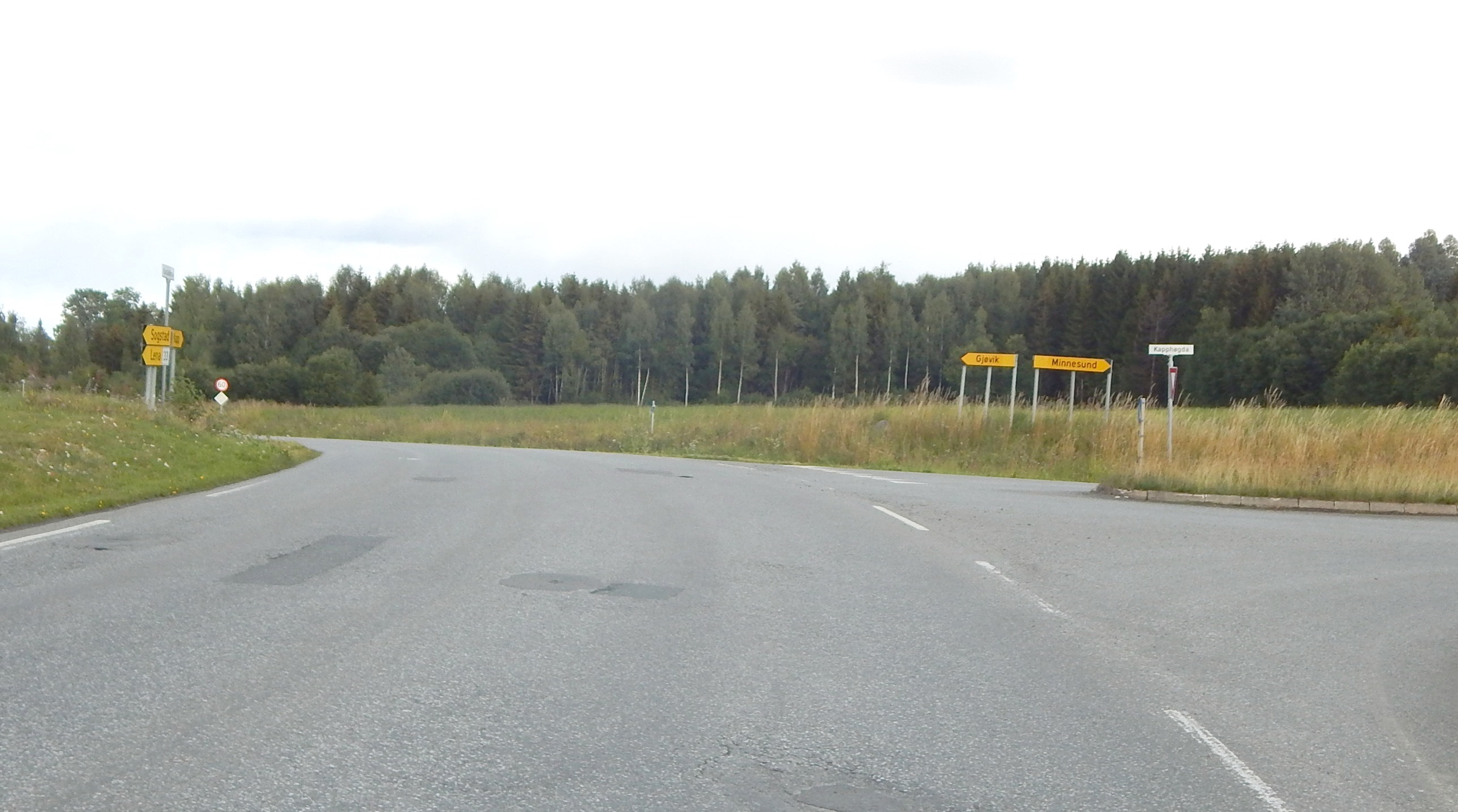 Rustadlinna (fylkesvei 2358, tidl. 87) i krysset med Kapphøgda